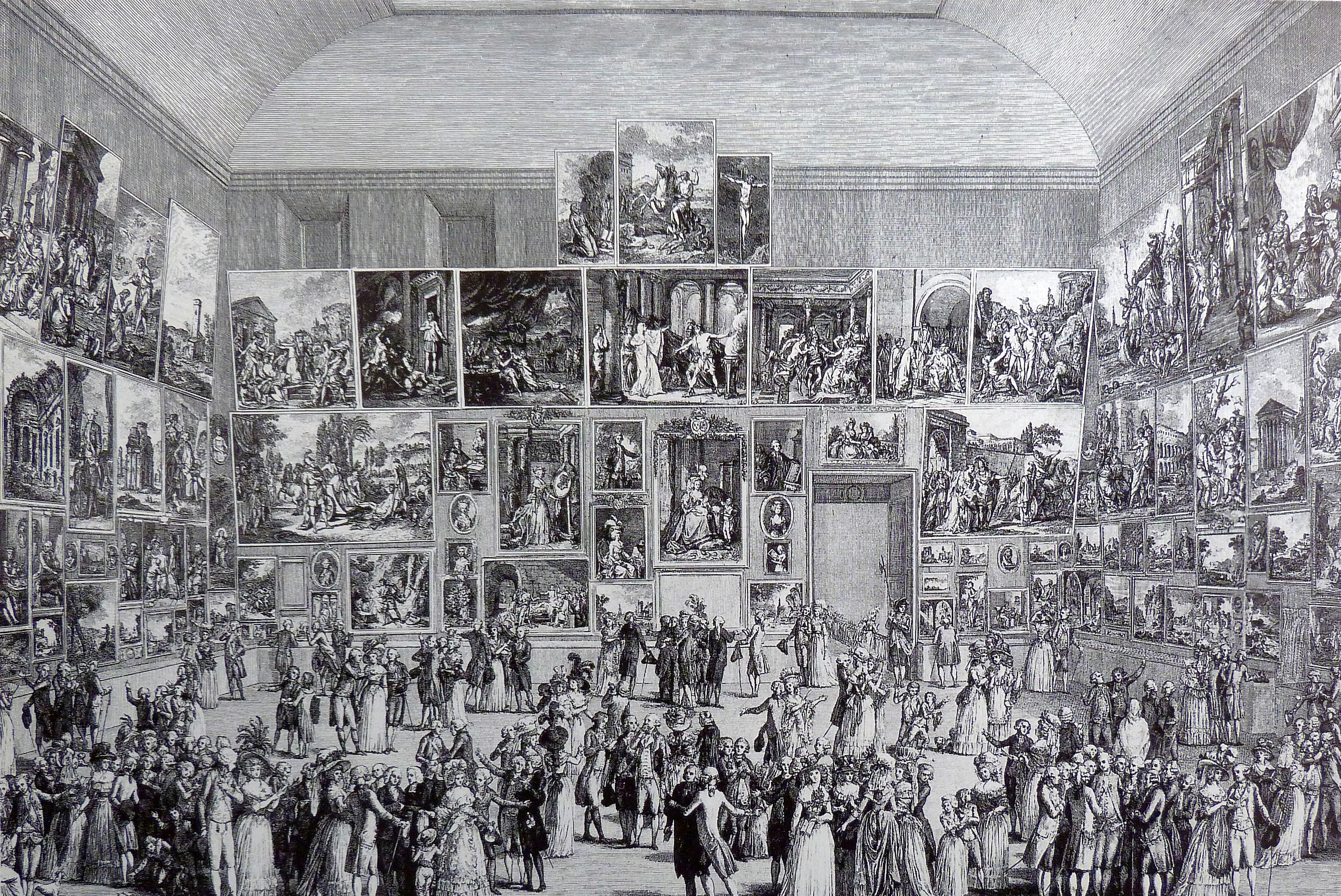 Exposition au Salon de 1787, eau-forte de Pietro Antonio Martini (1738–1797) - Paris, Bibliothèque nationale. Publié dans "Aux armes et aux Arts", Adam Biro, 1988.